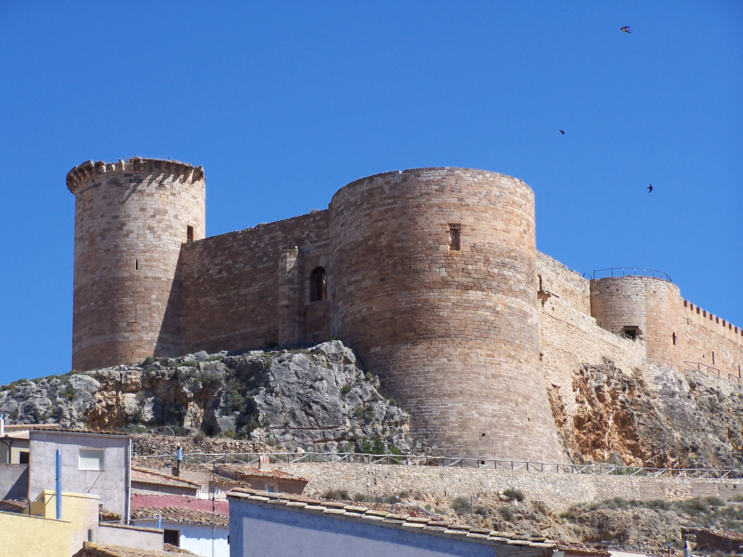 Castillo de Mesones de Isuela, vista de la cara norte